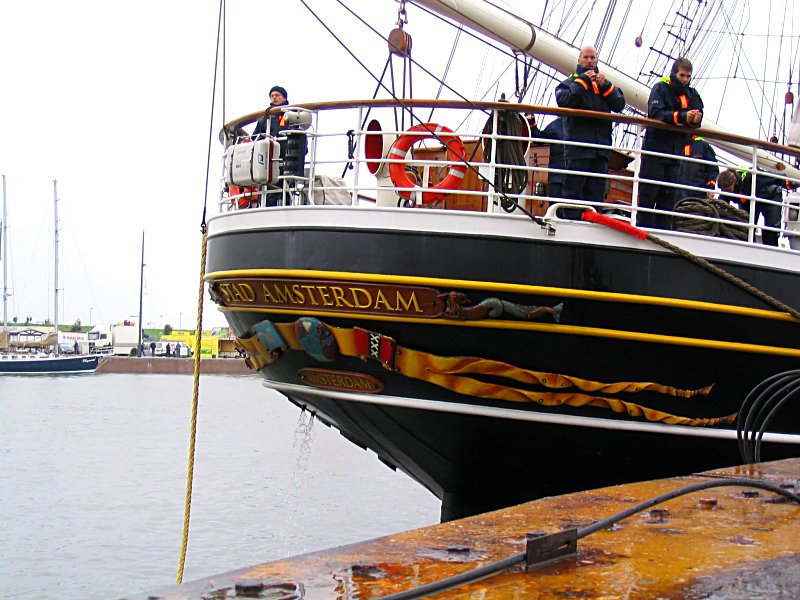 Stad Amsterdam in Heck-Ansicht